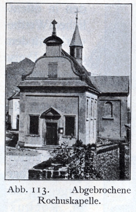 Rochuskapelle in Düsseldorf, erbaut 1667, abgebrochen 1897.jpg